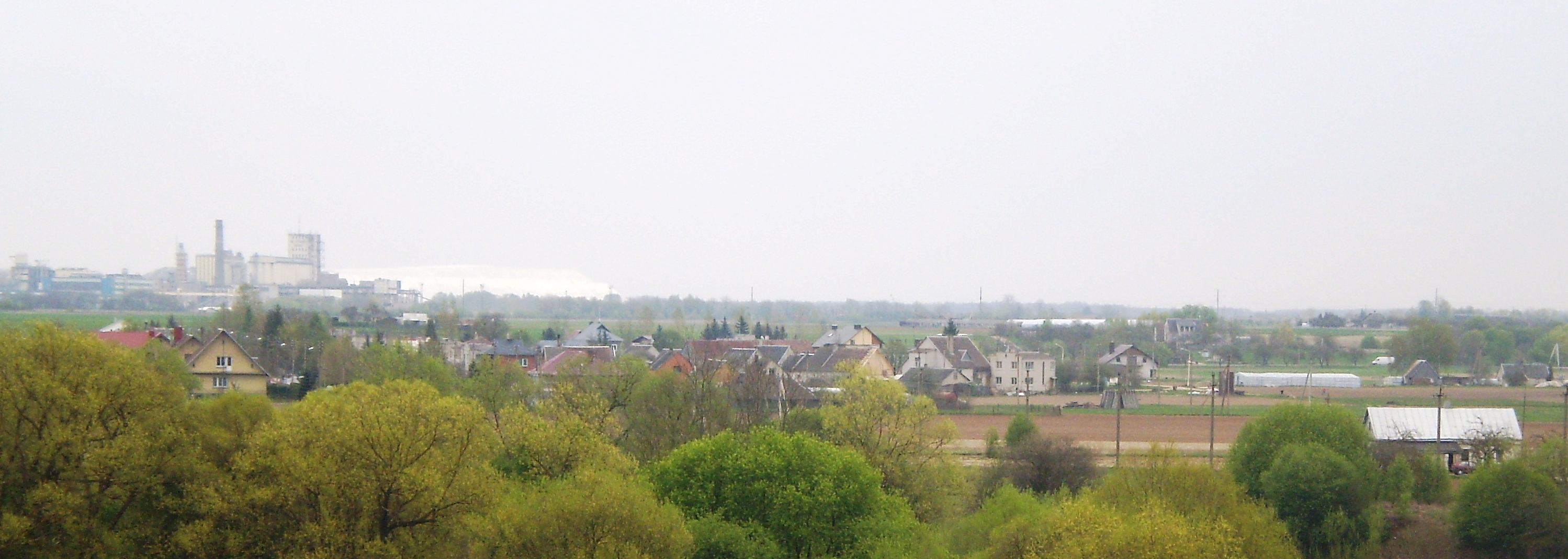 Paobelys nuo Nevėžio upės šlaito, Kėdainių raj.